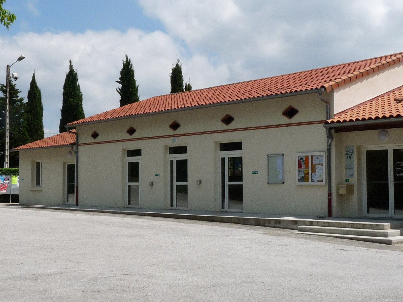 Salle des fêtes, Vendine, Haute-Garonne, France